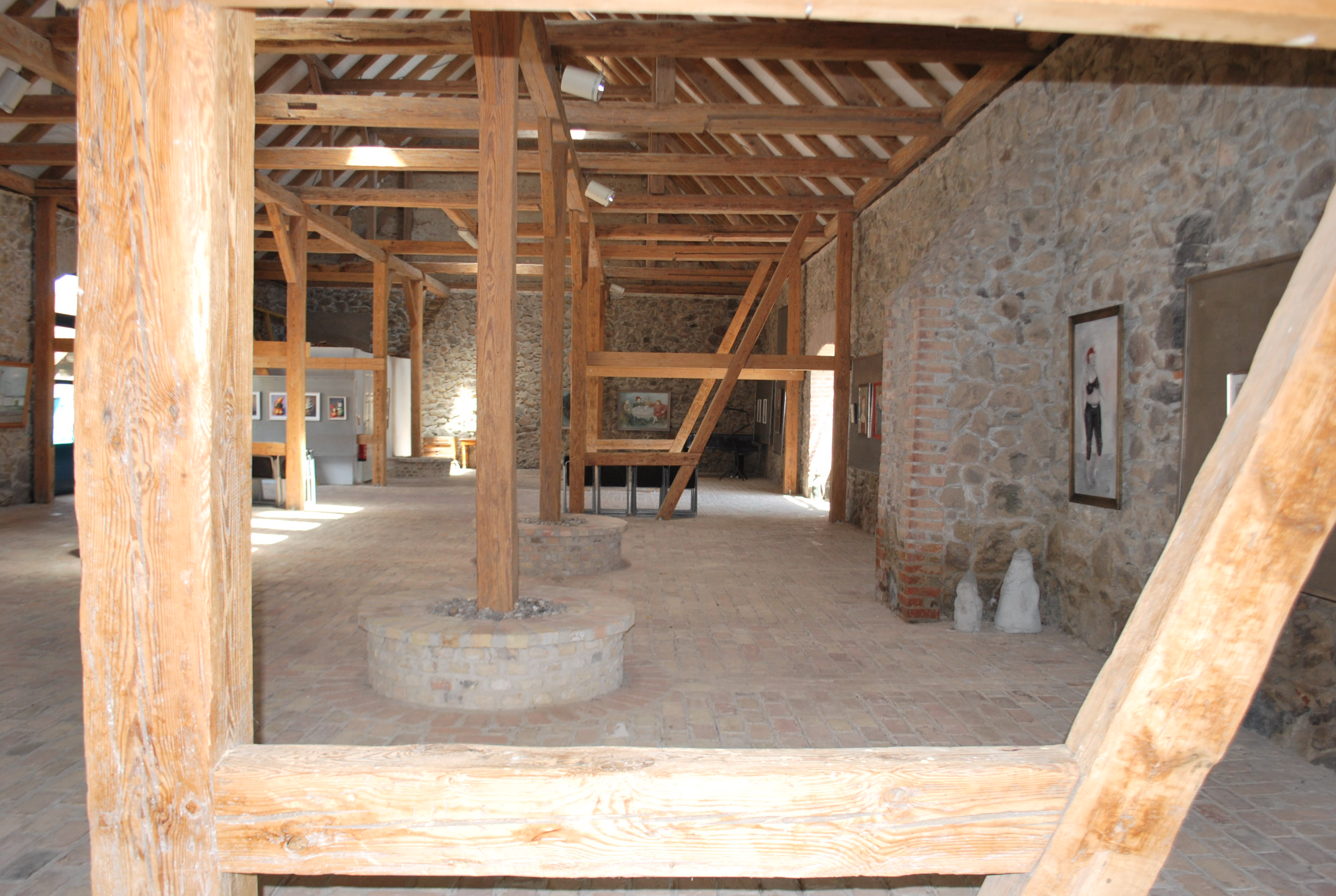 Innenraum der Feldsteinscheune im Kurt-Mühlenhaupt-Museum